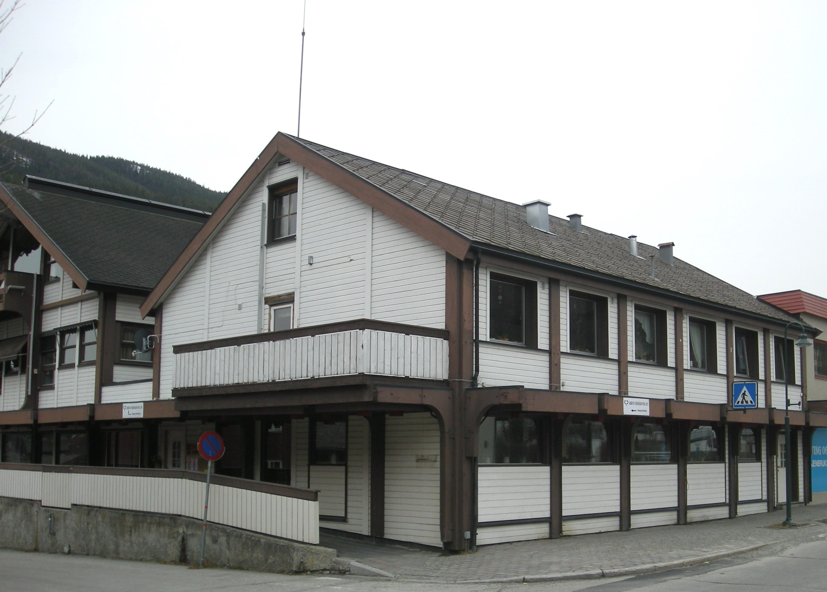 Kirkeadministrasjonen på Otta, som inneholder Otta bykirke.